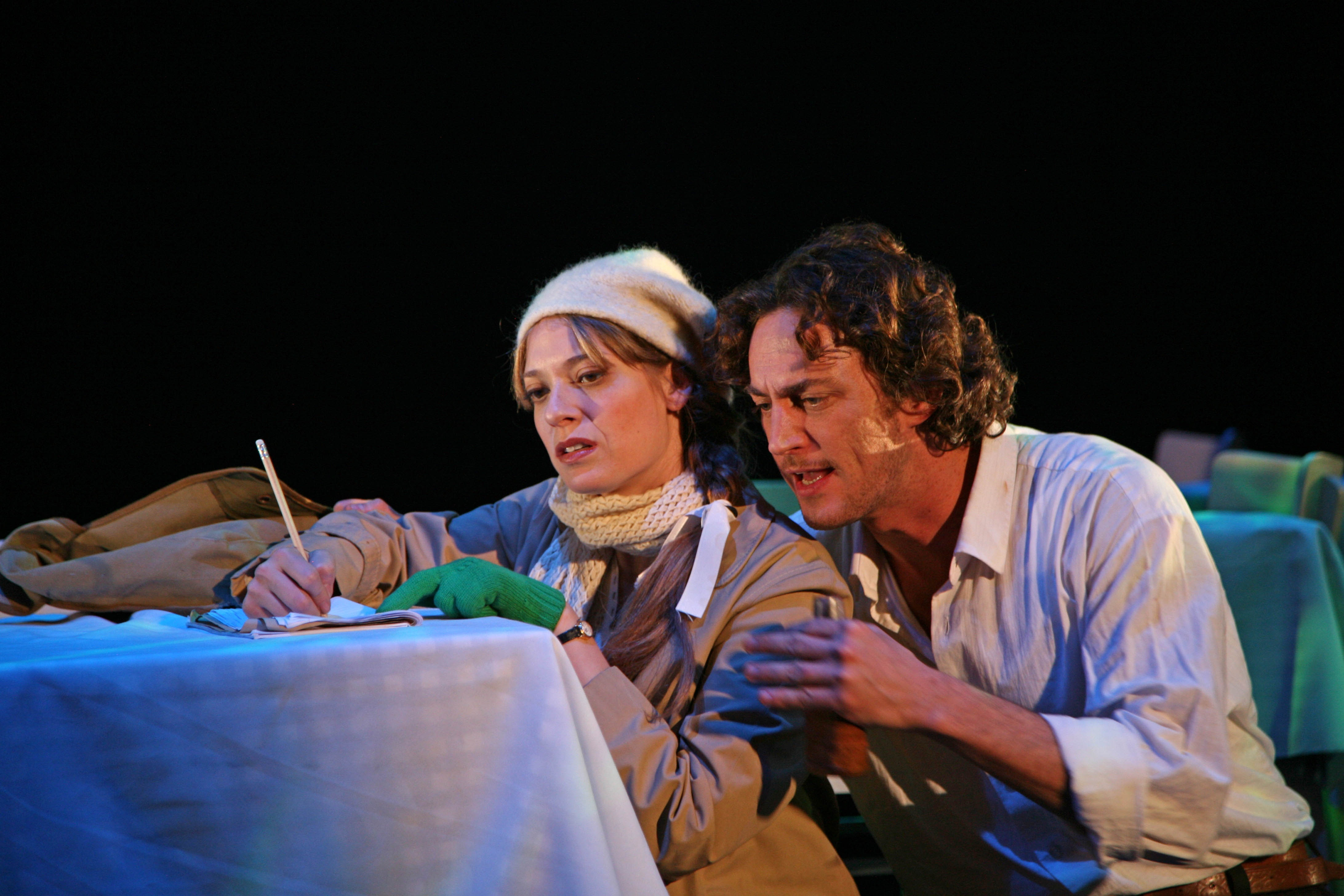 שירי גדני ויחזקאל לזרוב בהצגה היה או לא היה